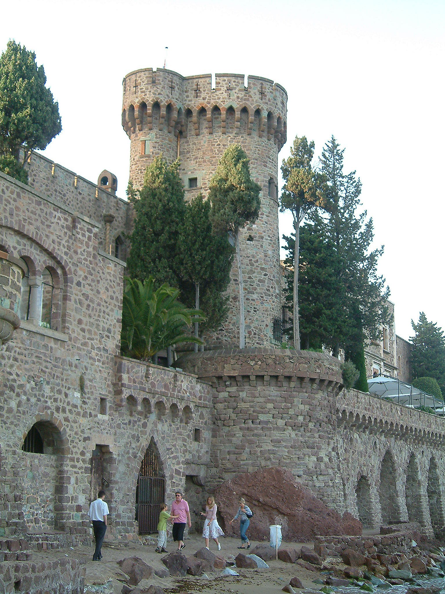 Château de Mandelieu-la-Napoule, FRANCE